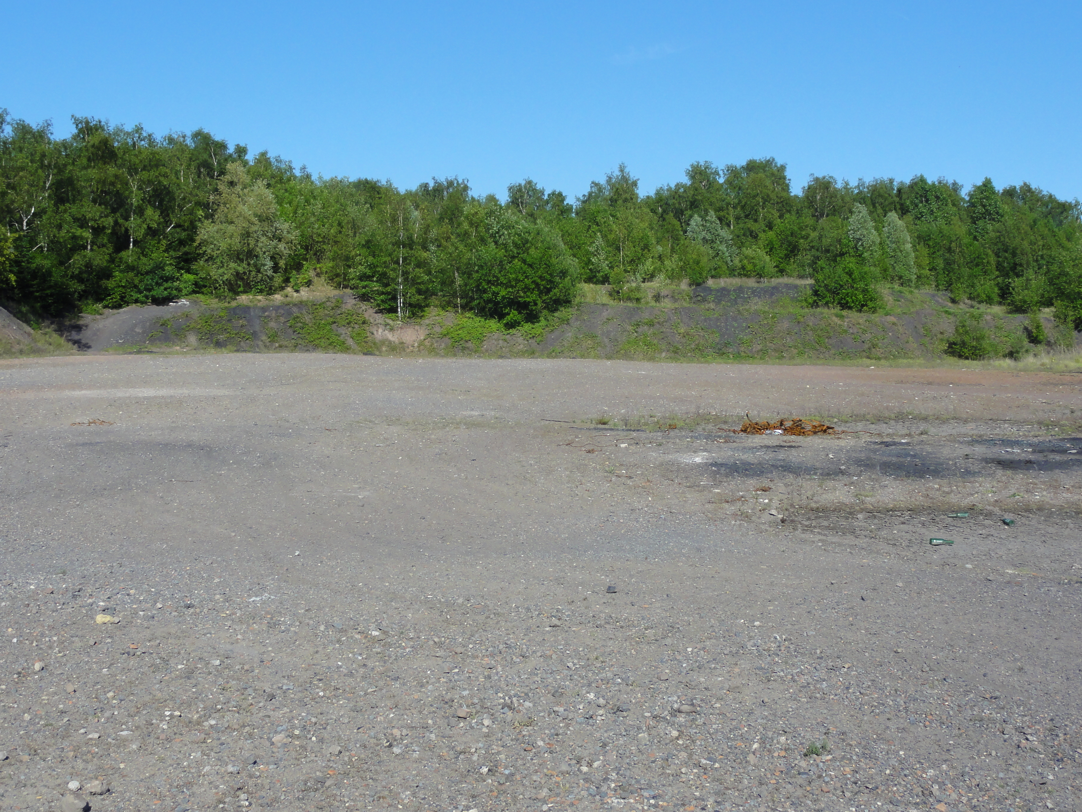 Terril n° 160 dit Arenberg, fosse Arenberg de la Compagnie des mines d'Anzin dans le bassin minier du Nord-Pas-de-Calais, Wallers, Nord, Nord-Pas-de-Calais, France.